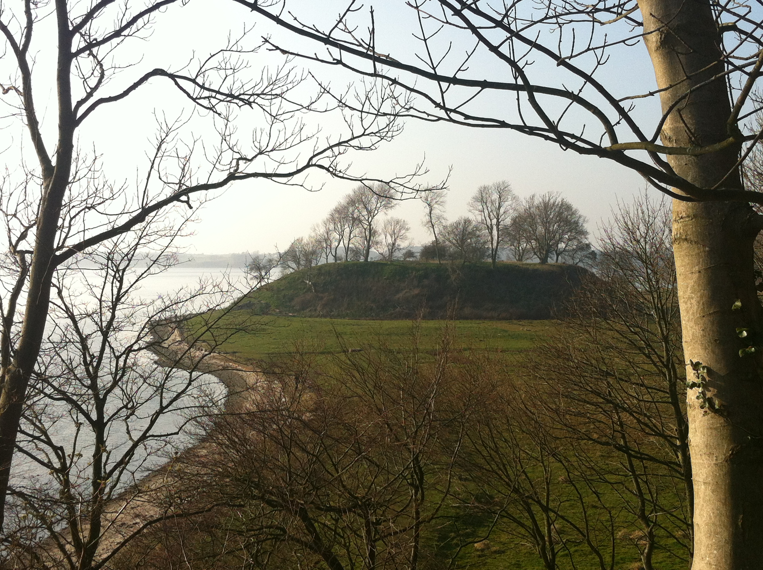 Udsigt over Hindsgavl Voldsted, marts 2014